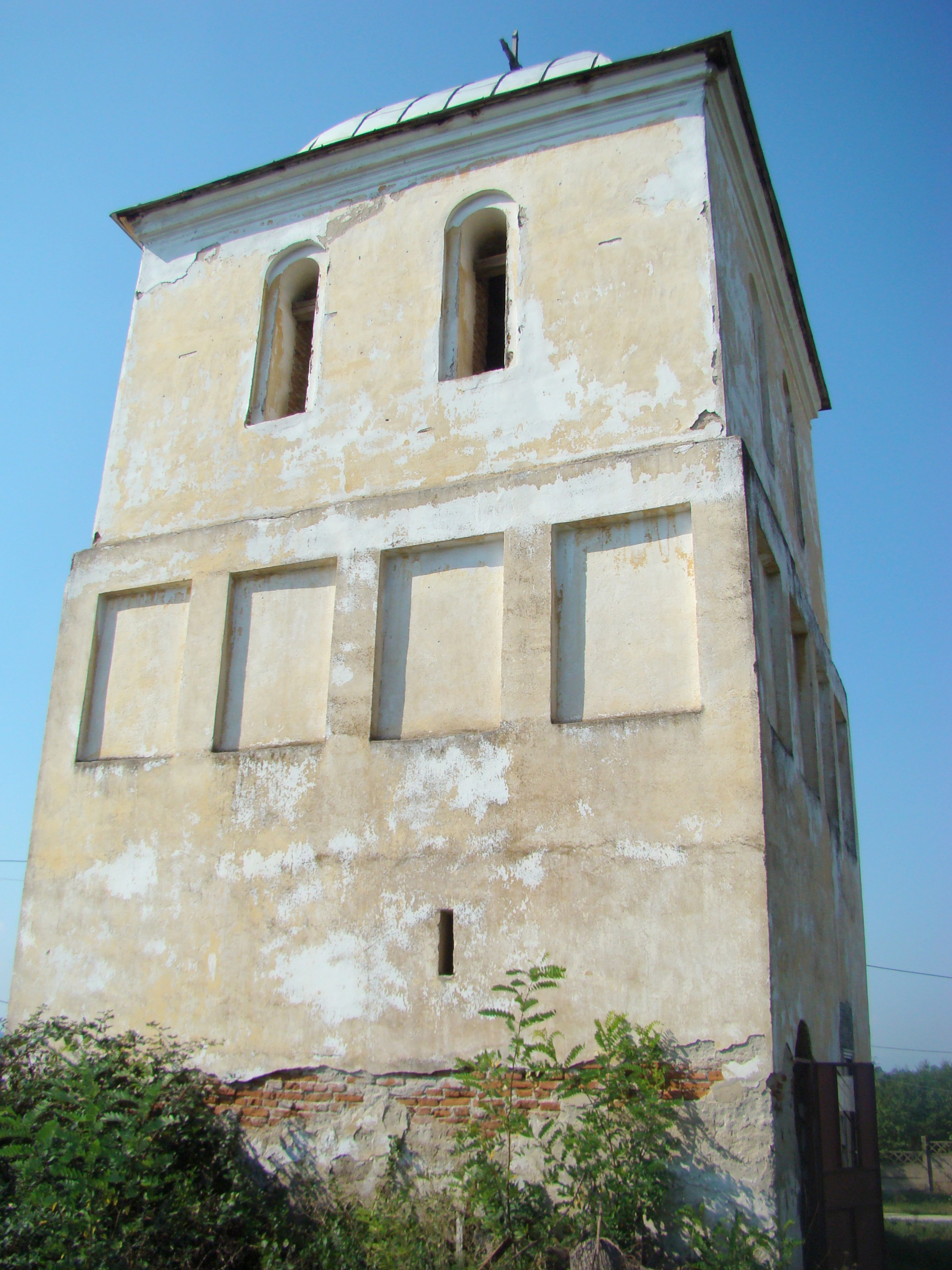 Turn-Clopotniță, sat Zegujani; comuna Florești 02